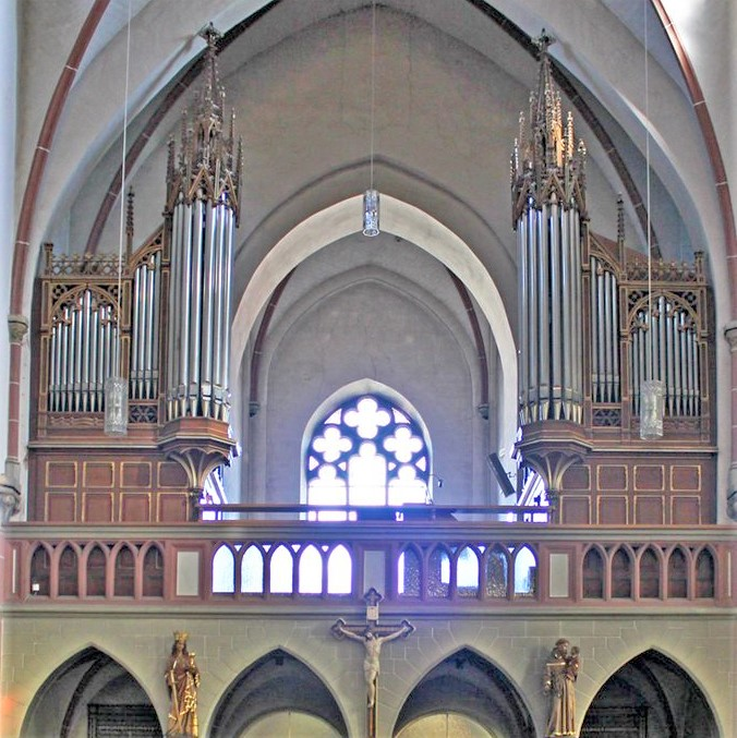 Orgelempore der katholischen Pfarrkirche St. Josef in Uchtelfangen, einem Ortsteil von Illingen, Landkreis Neunkirchen, Saarland